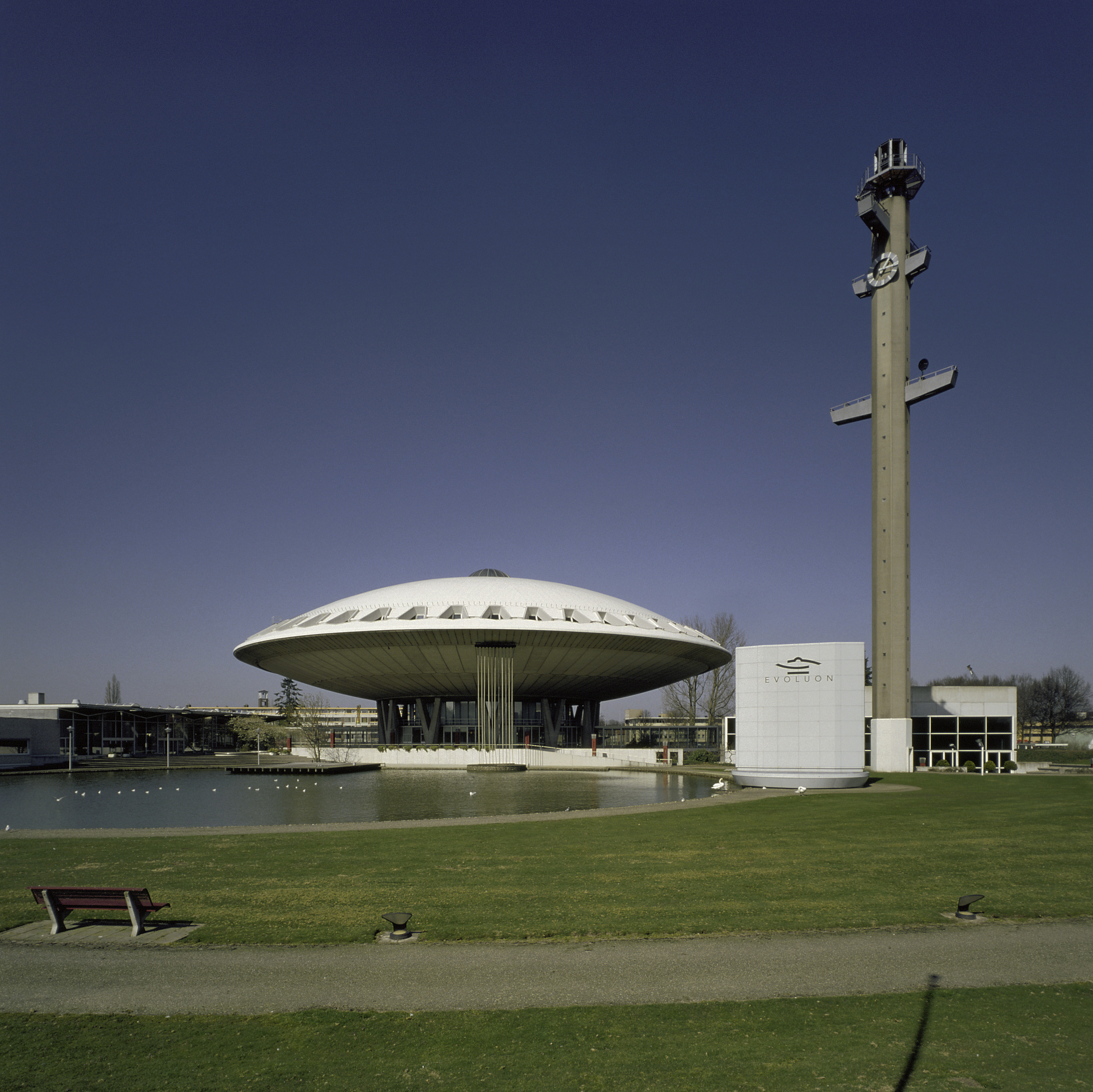 Evoluon: Overzicht (opmerking: Gefotografeerd voor Toonbeelden van de Wederopbouw)